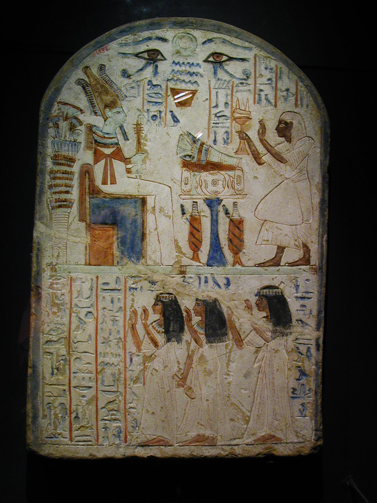 Fausse porte de Shespy (Template:VIe dynastie égyptienne, trouvé à Abydos), Musée national, Alexandrie, Égypte).